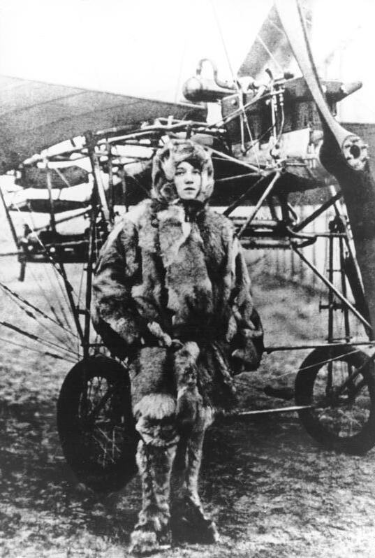 ADN-ZB/Repro 29.6.1983 Erinnerungen an die erste deutsche Motorfliegerin Melli Beese (1886-1925) aus Dresden widmete sich nach einem Bildhauerstudium in Stockholm ab 1910 mehr und mehr der Fliegerei. Nach anfänglichen Schwierigkeiten bei mehreren Fluggesellschaften, die sie als Pilotin ablehnten, weil Frauen "ungeeignet" seien, kam sie schließlich für hohes Schulgeld bei der "Deutschen Wright-Gesellschaft" unter. Am 27. Juli 1911 startete sie als einzige Pilotin unter 115 Fliegern in Deutschland zu einem Alleinflug mit einer "Rumpler-Taube". Im September 1911 stellte sie mit 825 Meter einen neuen Höhen-Passagier-Weltrekord für weibliche Piloten auf. Bald darauf gehörte ihr auch der Dauerweltrekord mit Passagier für Frauen. Bei der Herbstflugwoche 1911 in Johannisthal (Berlin) belegte sie unter 24 Teilnehmern aus verschiedenen Ländern den fünften Platz. Sie heiratete den bekannten französischen Piloten Charles Boutard. Mit Beginn des I. Weltkrieges wurde ihr die Flugerlaubnis entzogen und ihr Mann verhaftet. Vor dem Weihnachtsfest 1925 schied sie aus dem Leben.